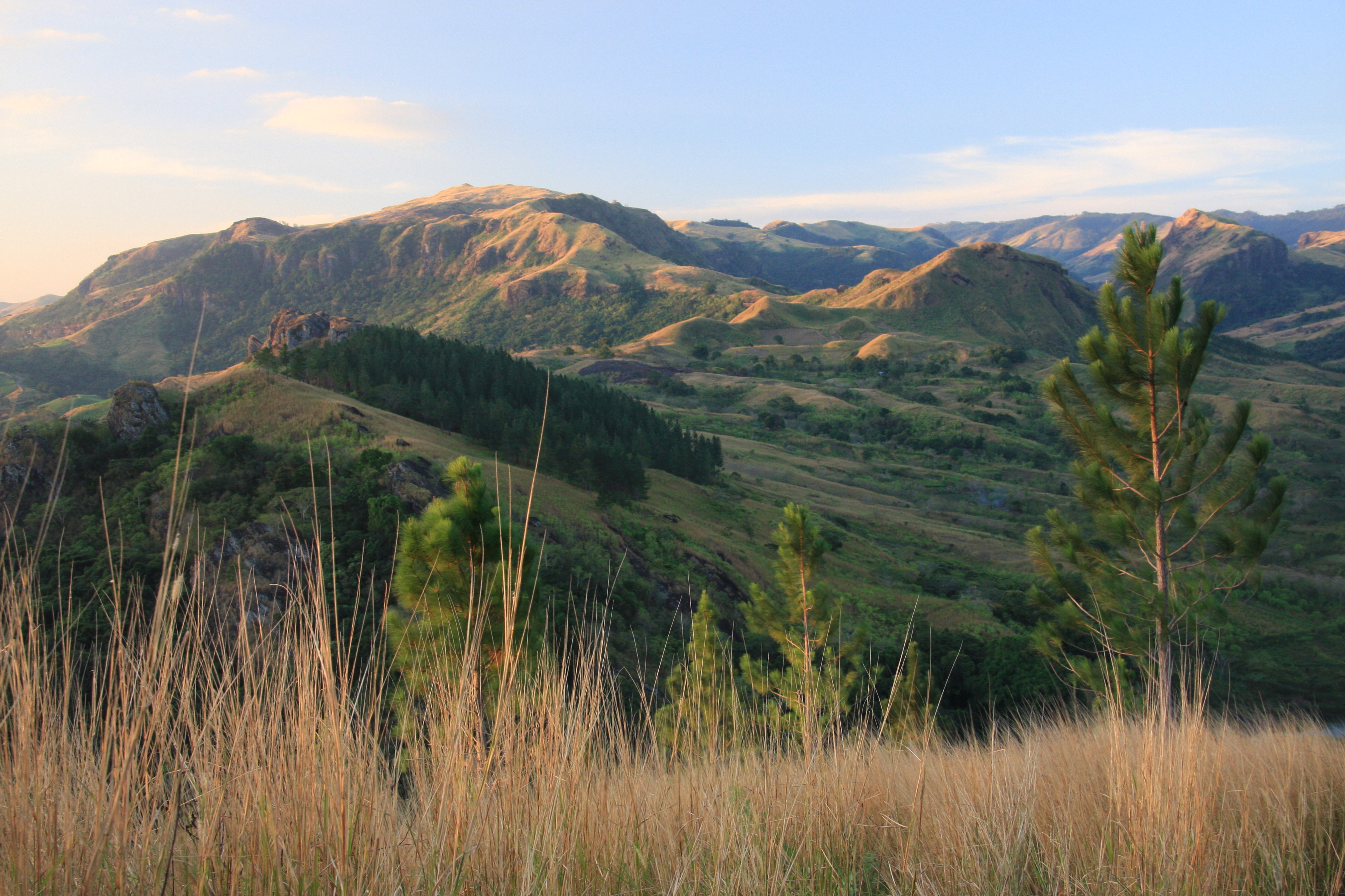 Nausori Highlands on Viti Levu, Fiji